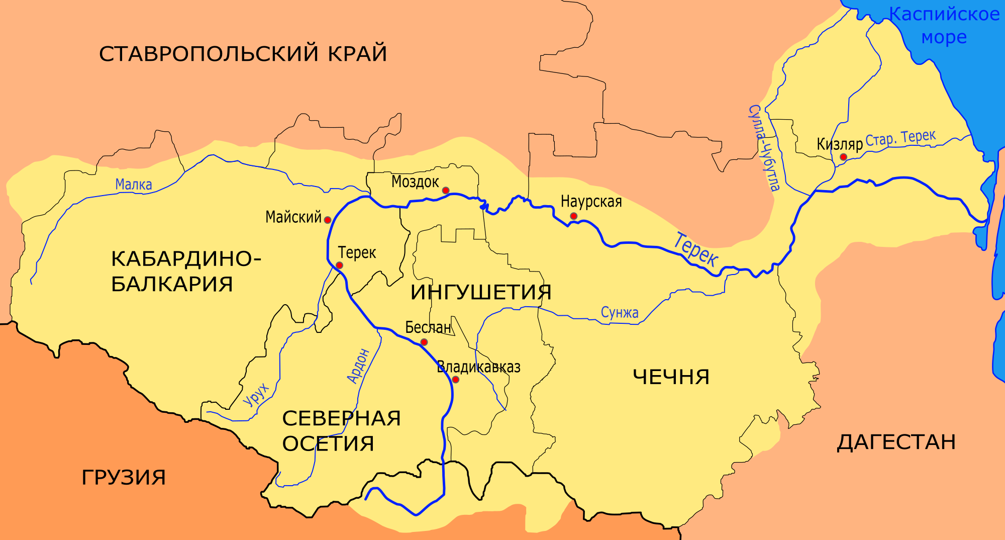 Схема бассейна реки Терек